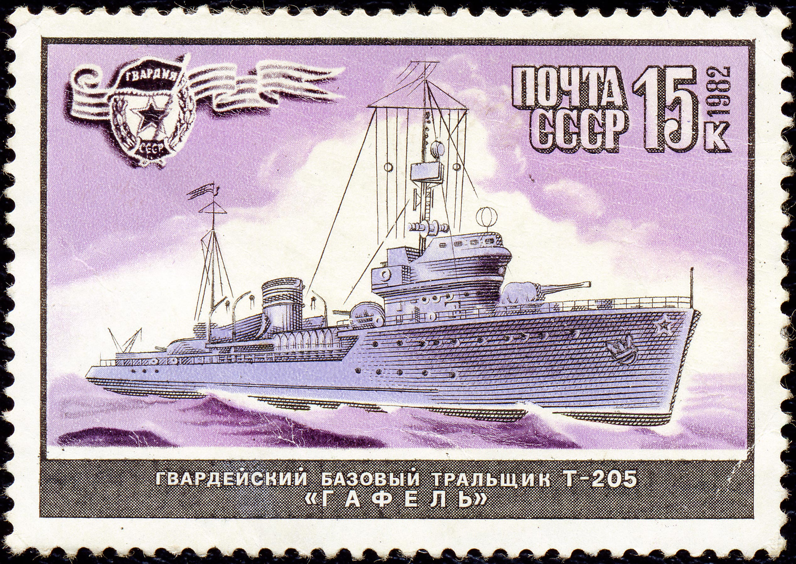 Почтовая марка СССР. 1982. Гвардейский базовый тральщик Т-205 Гафель (проект 53У) CPA # 5336